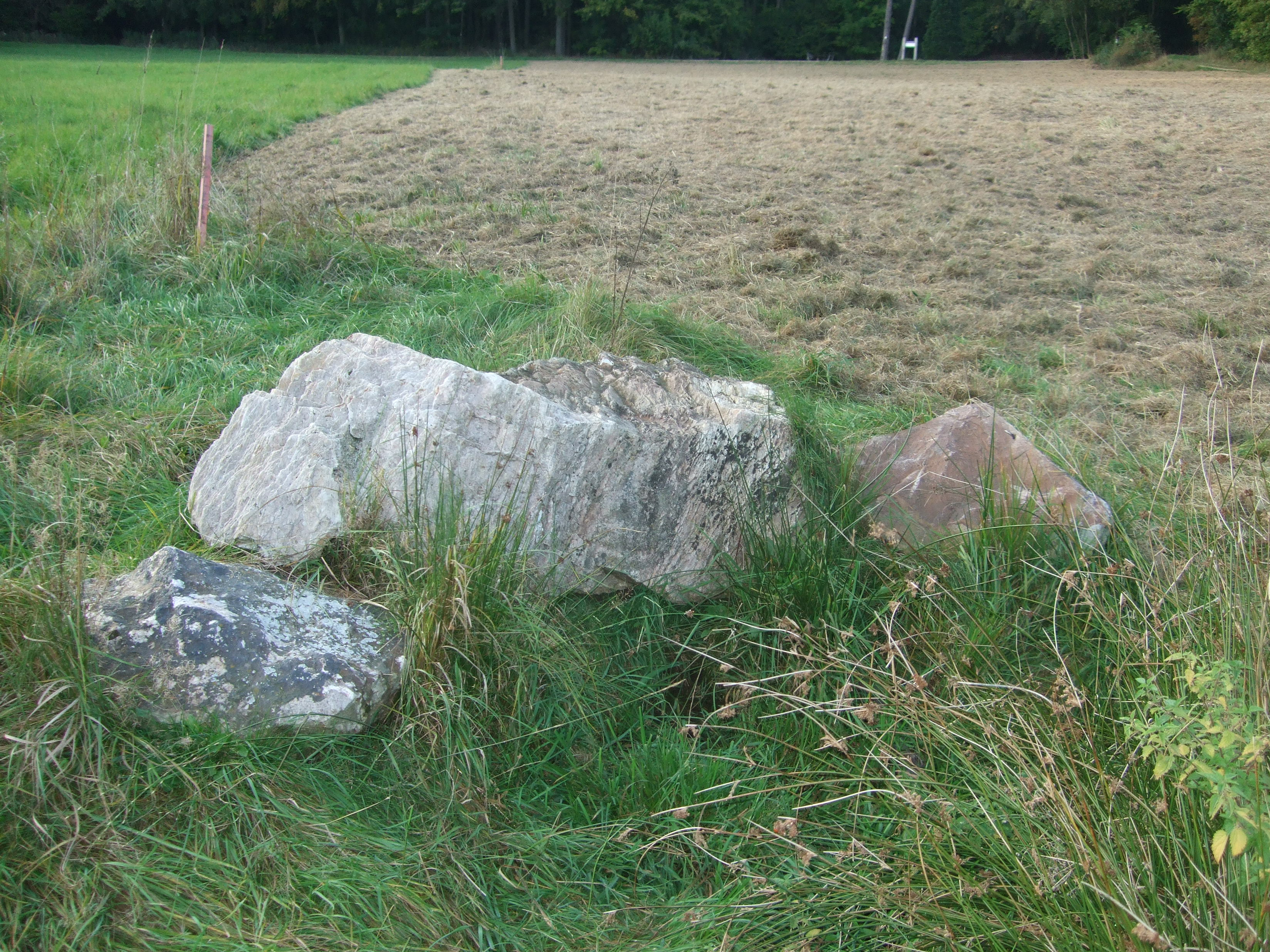 Aarquelle